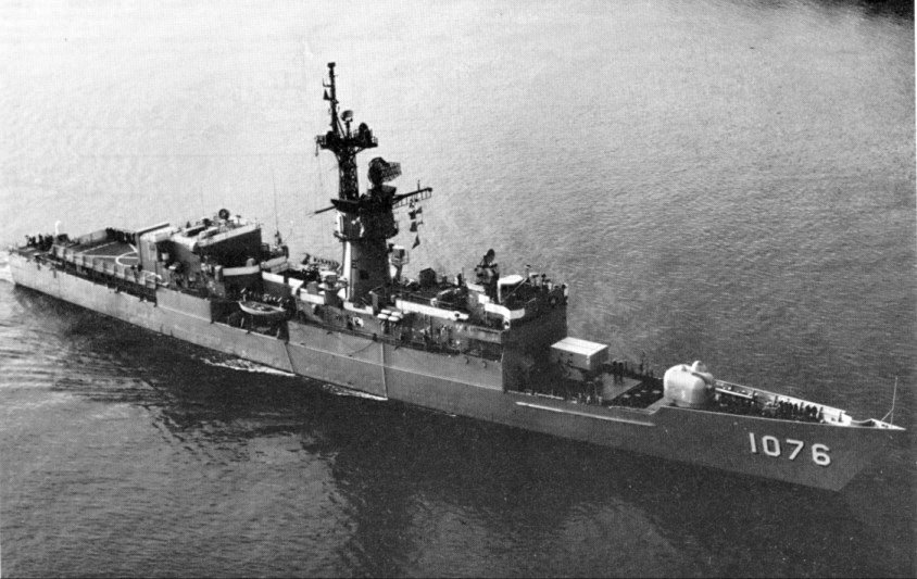 USS Fanning (DE 1076)